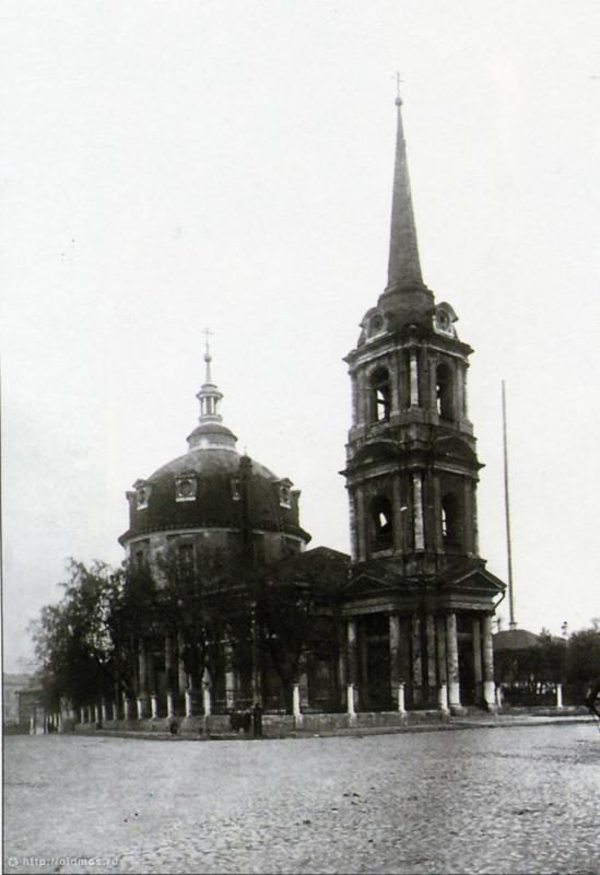 Первая радиостанция Коминтерна